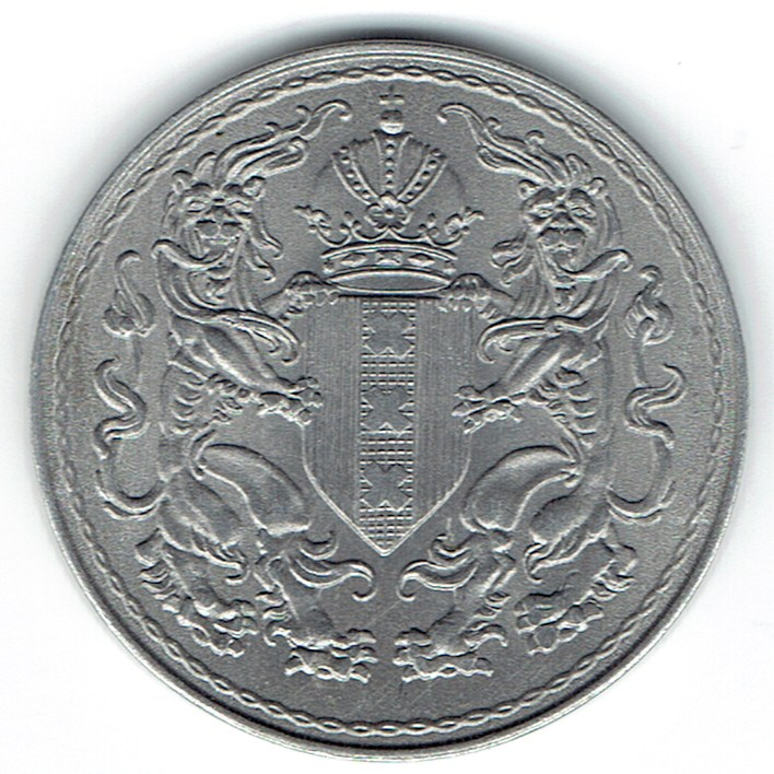 Voorzijde elektriciteitspenning van de gemeente Amsterdam (ontwerp uit 1918, uitgevoerd in aluminium, waarde 1 gulden)